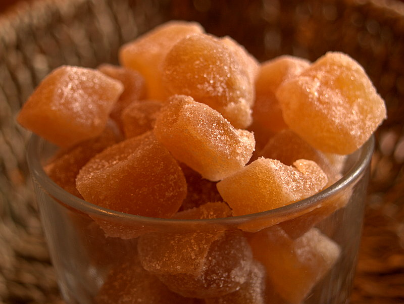 Candied ginger